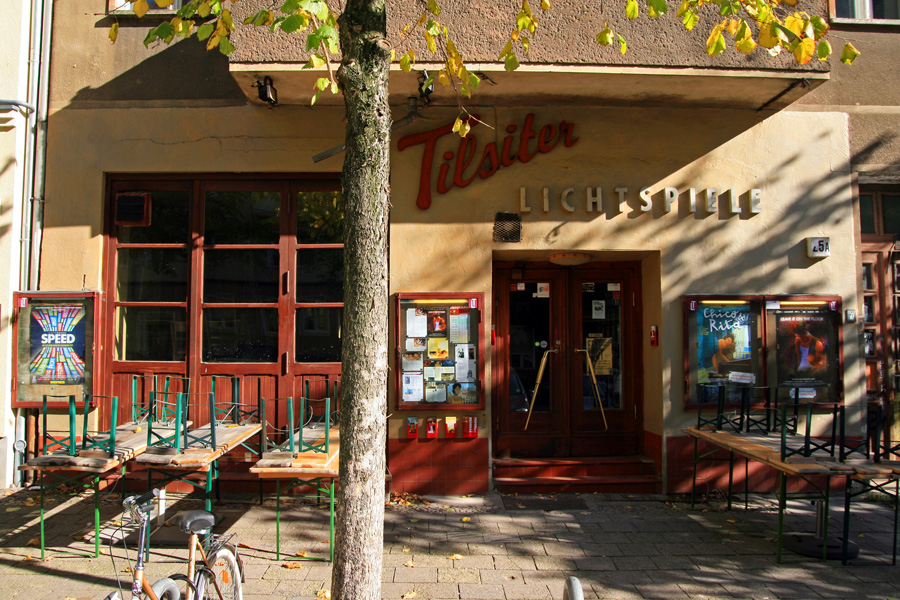 Die Tilsiter Lichtspiele im Herbst 2012